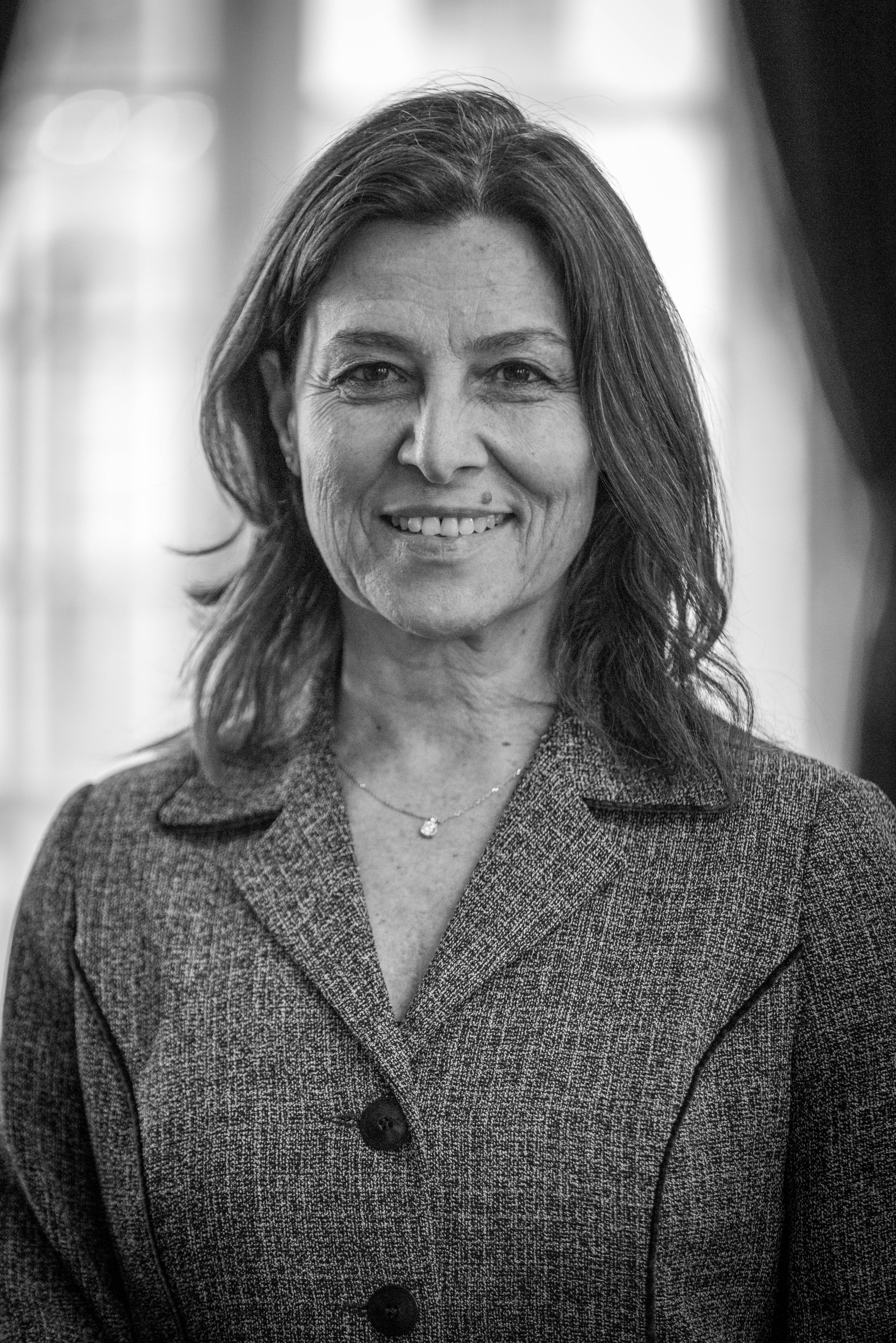 Aliza Bin-Noun par Claude Truong-Ngoc mars 2016